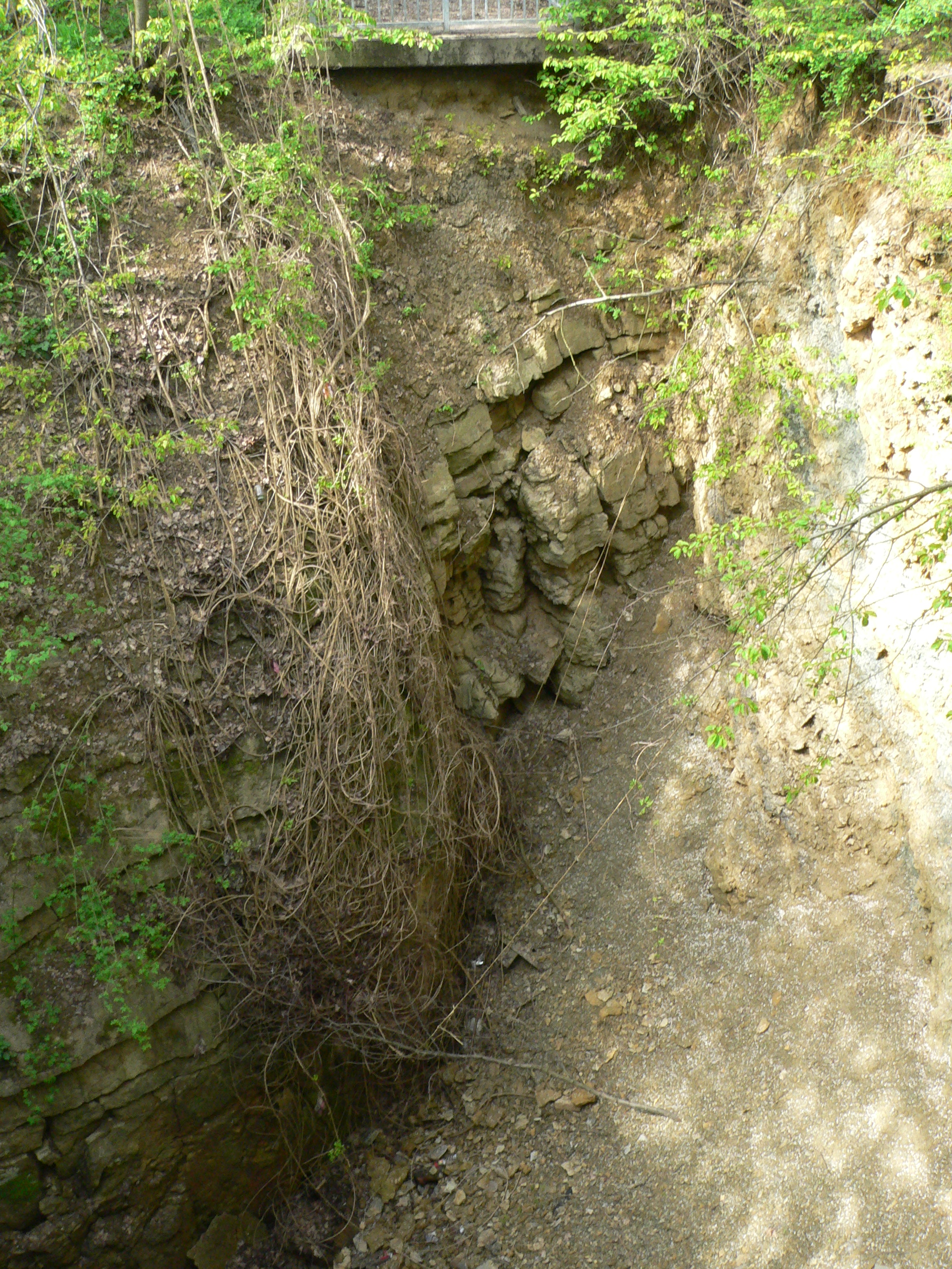 The sinkhole "Neues Eisinger Loch" near Neulingen, Germany